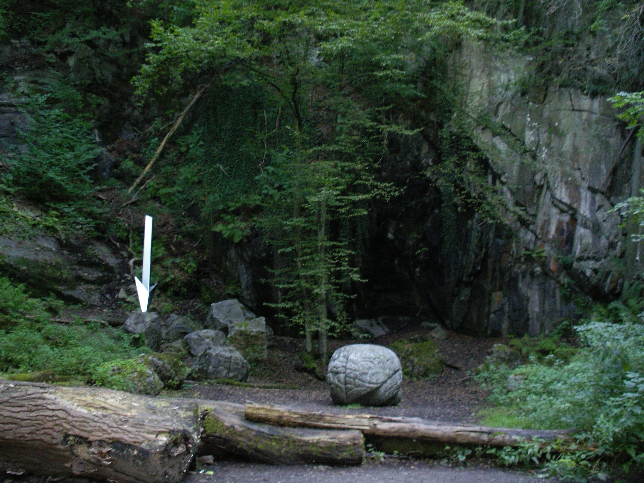 Kunstweg MenschenSpuren: Skulptur „Memoria Mundi“ (Pfeil und Gehirn) von Anne und Patrick Poirier in einem Altsteinbruch am Weg „Thekhauser Quall“ im Naturschutzgebiet „Neandertal“ in Erkrath